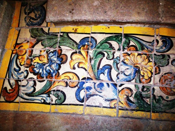 Pavimento in ceramica cerretese (1730 circa) realizzato dal ceramista Nicolò Russo nella chiesa di San Gennaro in Cerreto Sannita.